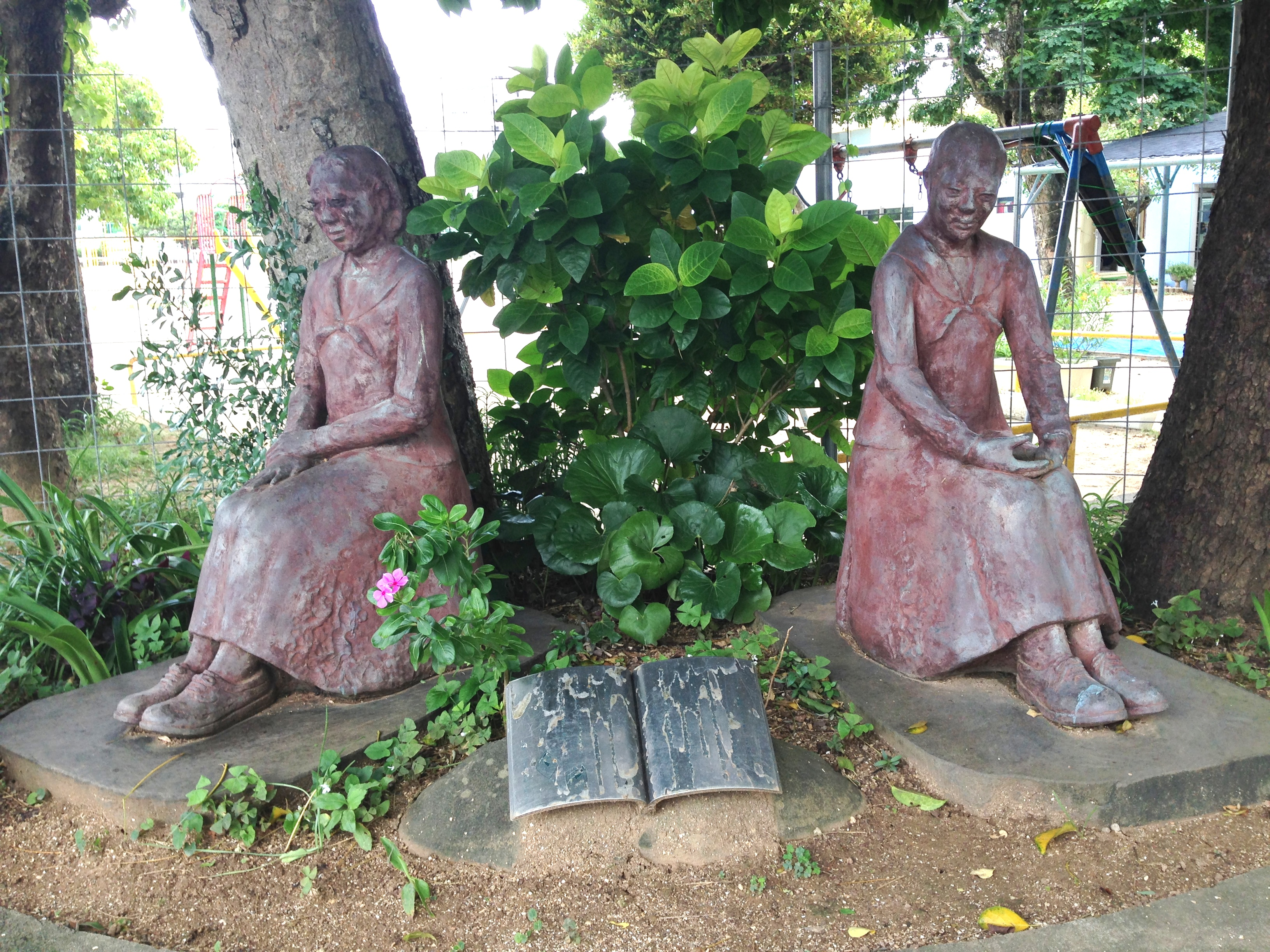 ひめゆり学園跡のモニュメント